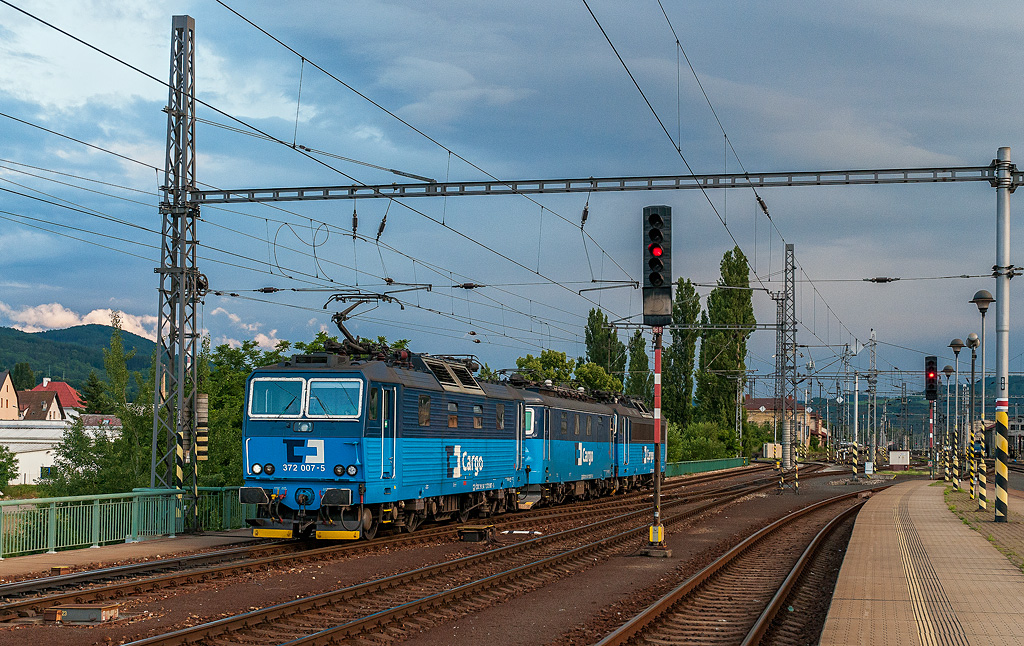 Konvoj lokomotiv 372.007, 122.007 a 363.051 firmy ČD Cargo při posunu ve stanici Děčín hlavní nádraží.